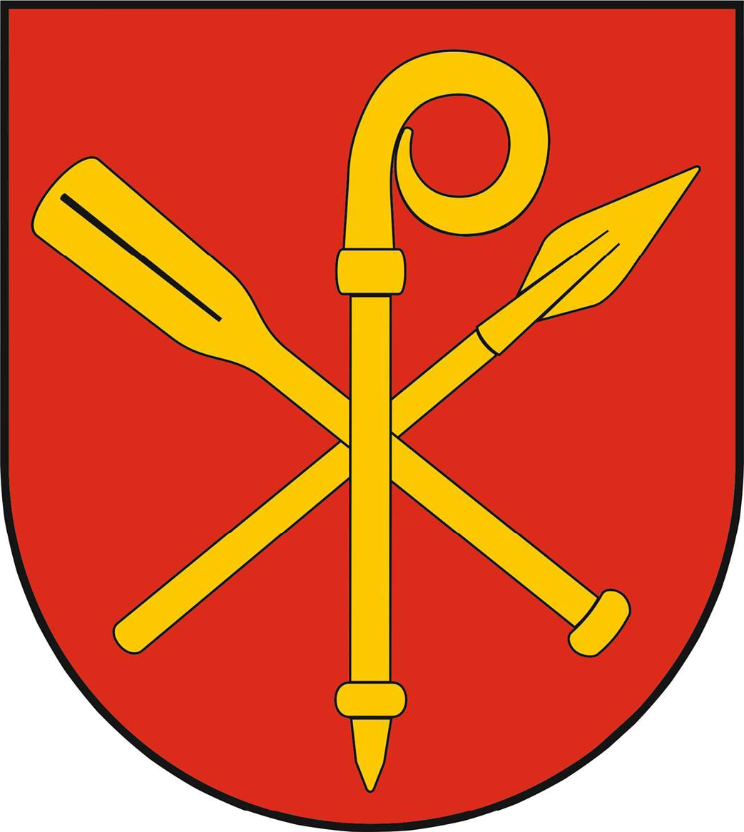 Herb gminy Rychliki